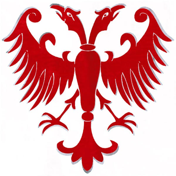 Опис слике: Црвени двоглави орао је најважнији династички, државни и национални симбол Срба у средњем веку. Није нам познато колико далеко сеже у прошлост пракса коришћења овог симбола код Срба, али од периода Стефана Немање (1113-1199), великог жупана (владао: 1166-1196) исти је дефинитивно постао главни изражајни (читај: спољни) симбол династије, државе (српског етничког корпуса на Хемском полуострву/Балкану) и нешто касније српског краљевства (од 1217. године), односно деспотовине (1402-1459).